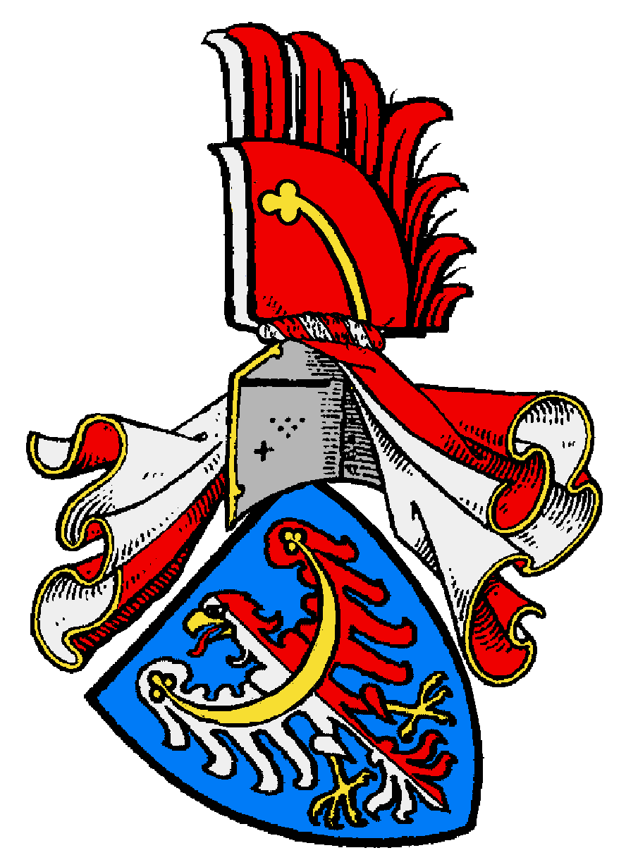 Wappen der Kolowrat (tschechisch Kolovratové, auch Krakovští z Kolovrat), eines böhmischen Uradelsgeschlechts mit gleichen Vorfahren wie die Herren und Reichsgrafen Sahrer von Sahr, auch: Schdiar von Schdiar, gelegentlich auch von Saar, tschechisch: Žďárští ze Žďáru und alttschechisch: Zdiárský ze Zdiáru, lateinisch: de Sora oder de Sara, die Herren von Janovic (deutsch von Janowitz) oder die Herren von Vimperk (deutsch von Winterberg). Verwandtschaft besteht auch mit den Rittern und Grafen Čejka von Olbramovic (deutsch Czejka von Olbramowitz) sowie mit den Rittergeschlechtern Dvořecký von Olbramovic (deutsch Dvoretzky von Olbramowitz), Podolský von Olbramowitz und Zrucký von Chřenovic. → [1]